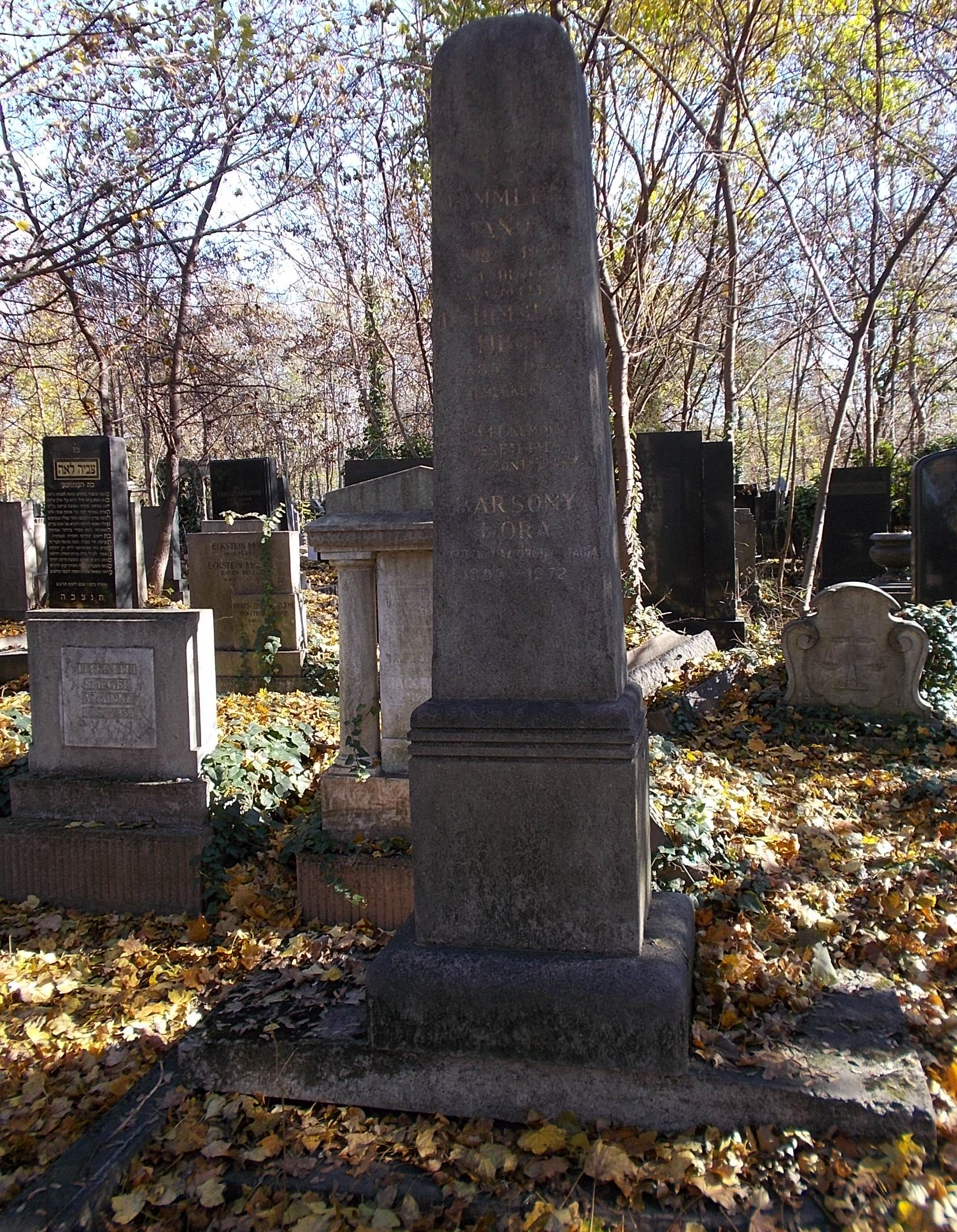 Bársony Dóra (1883-1972) opera-énekesnő sírja 2015-ben a Kozma utcai izraelita temetőben [1/A-2-25] (Budapest, X. ker., Kozma utca 6.)